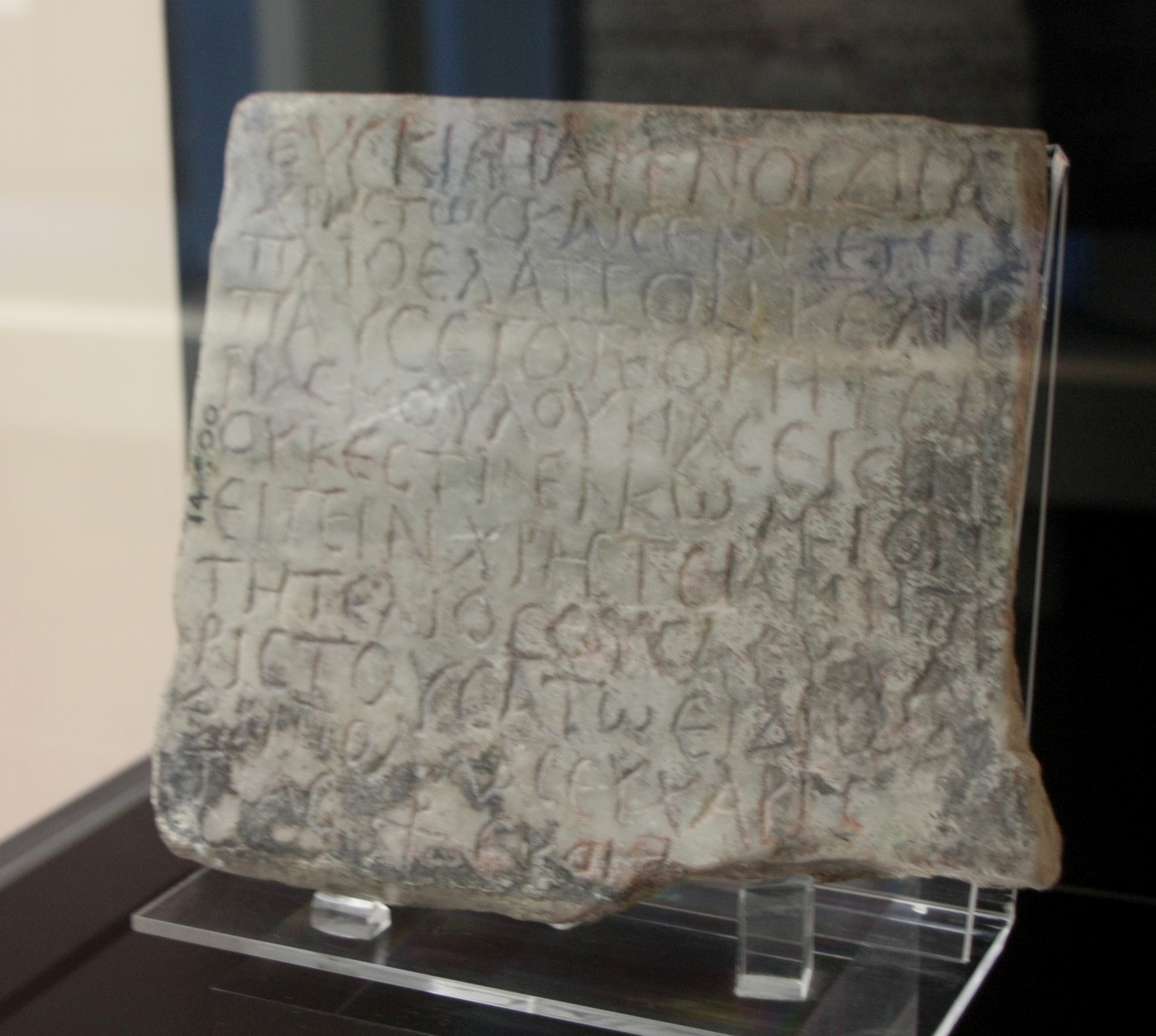 Iscrizione di Euksia inizi V sec d.C.